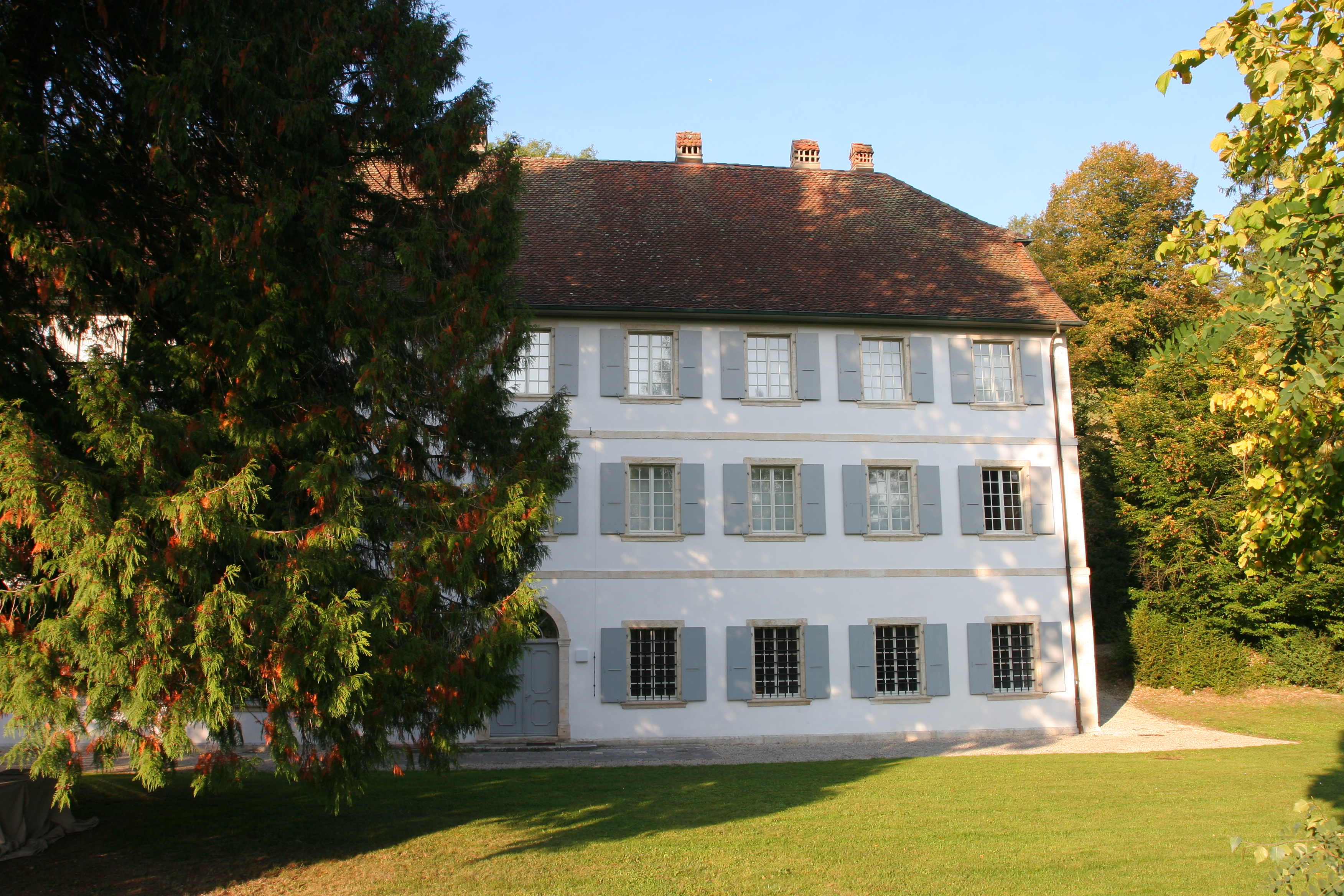 Vue sud de l'ancien Prieuré de Grandgourt depuis une porte latérale